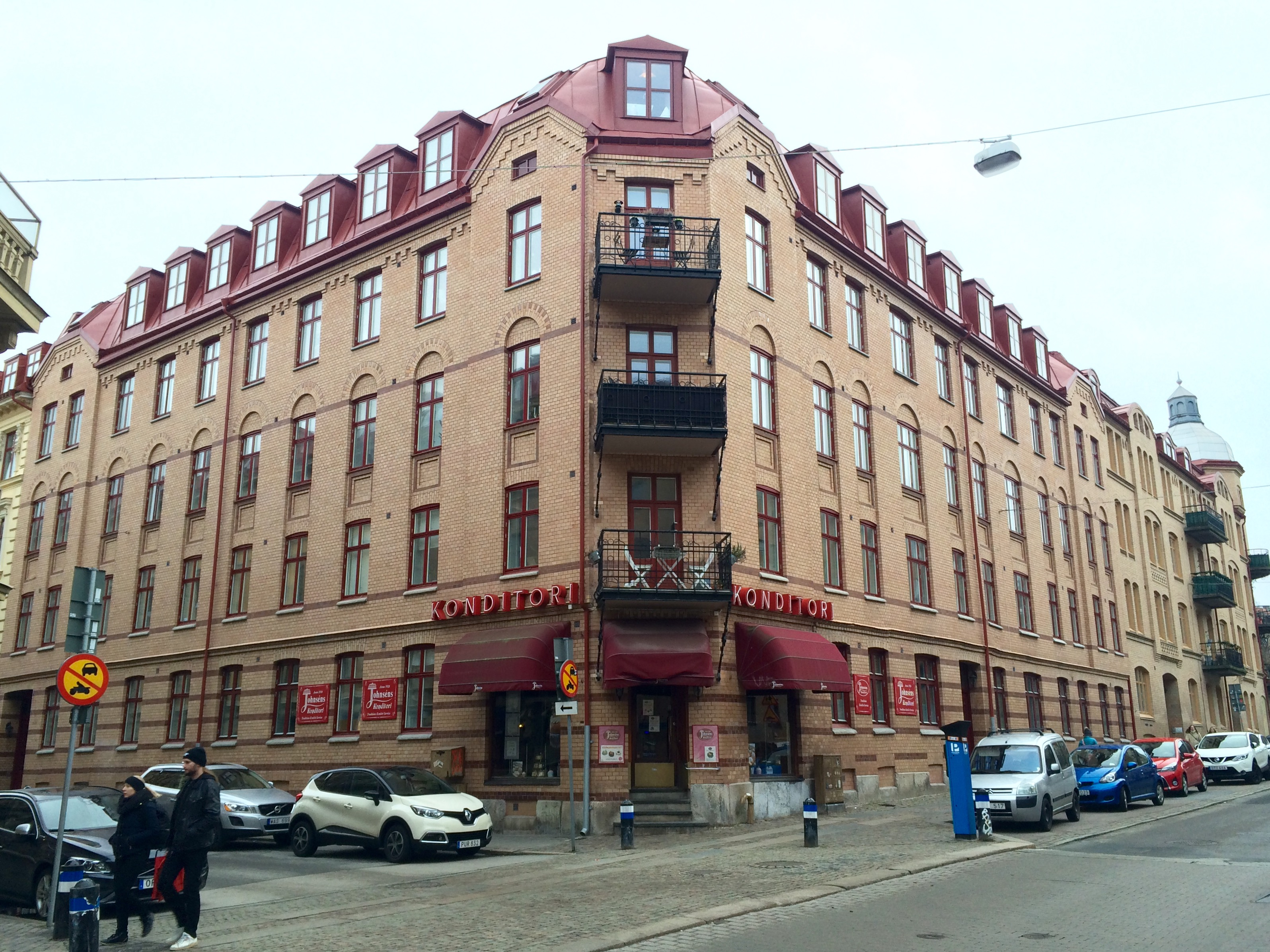 Johnséns konditori vid Värmlandsgatan 22 i hörnet mot Tredje Långgatan i Masthugget, Göteborg.